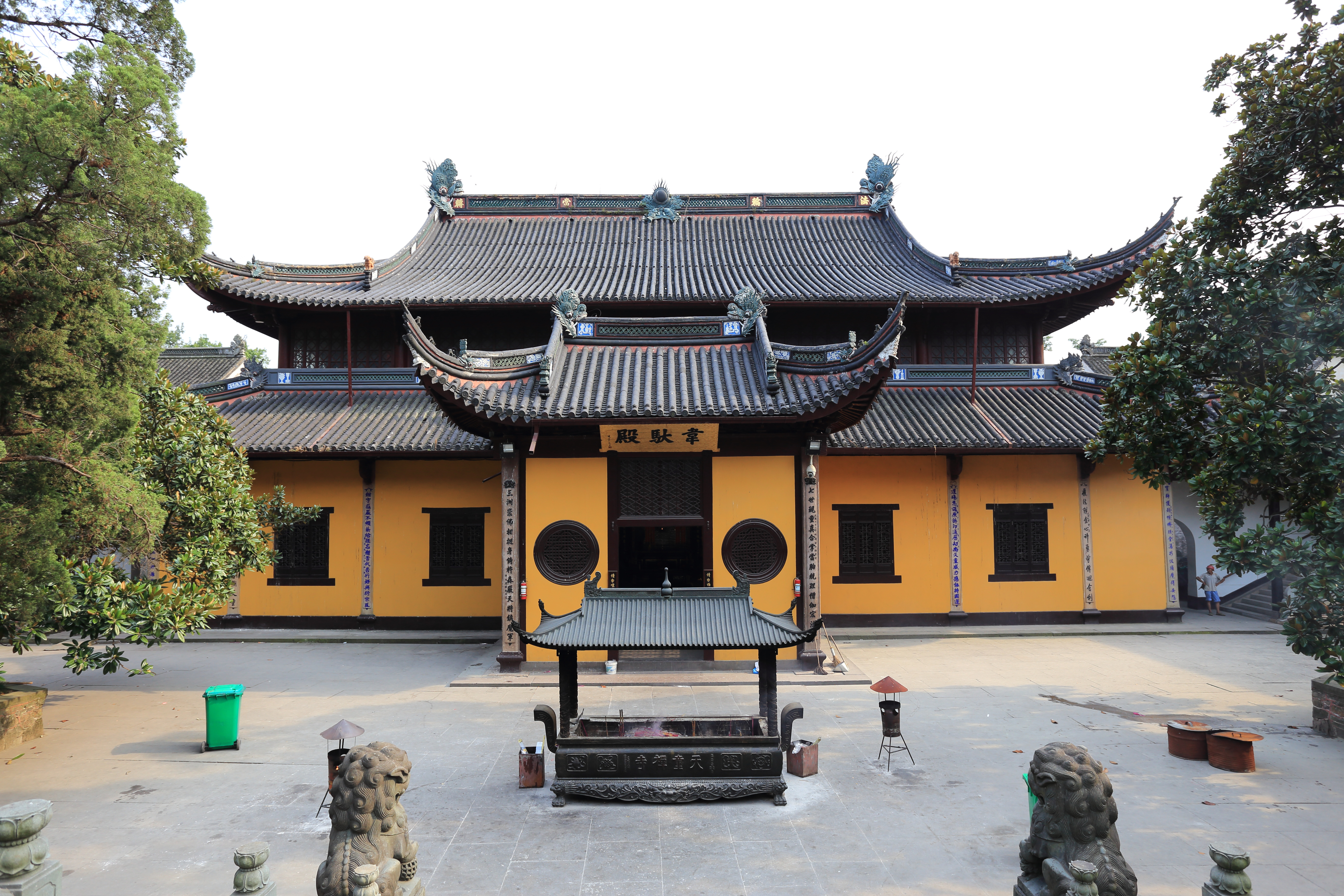 宁波天童寺 —— 天王殿后部出抱厦，匾额称韦陀殿